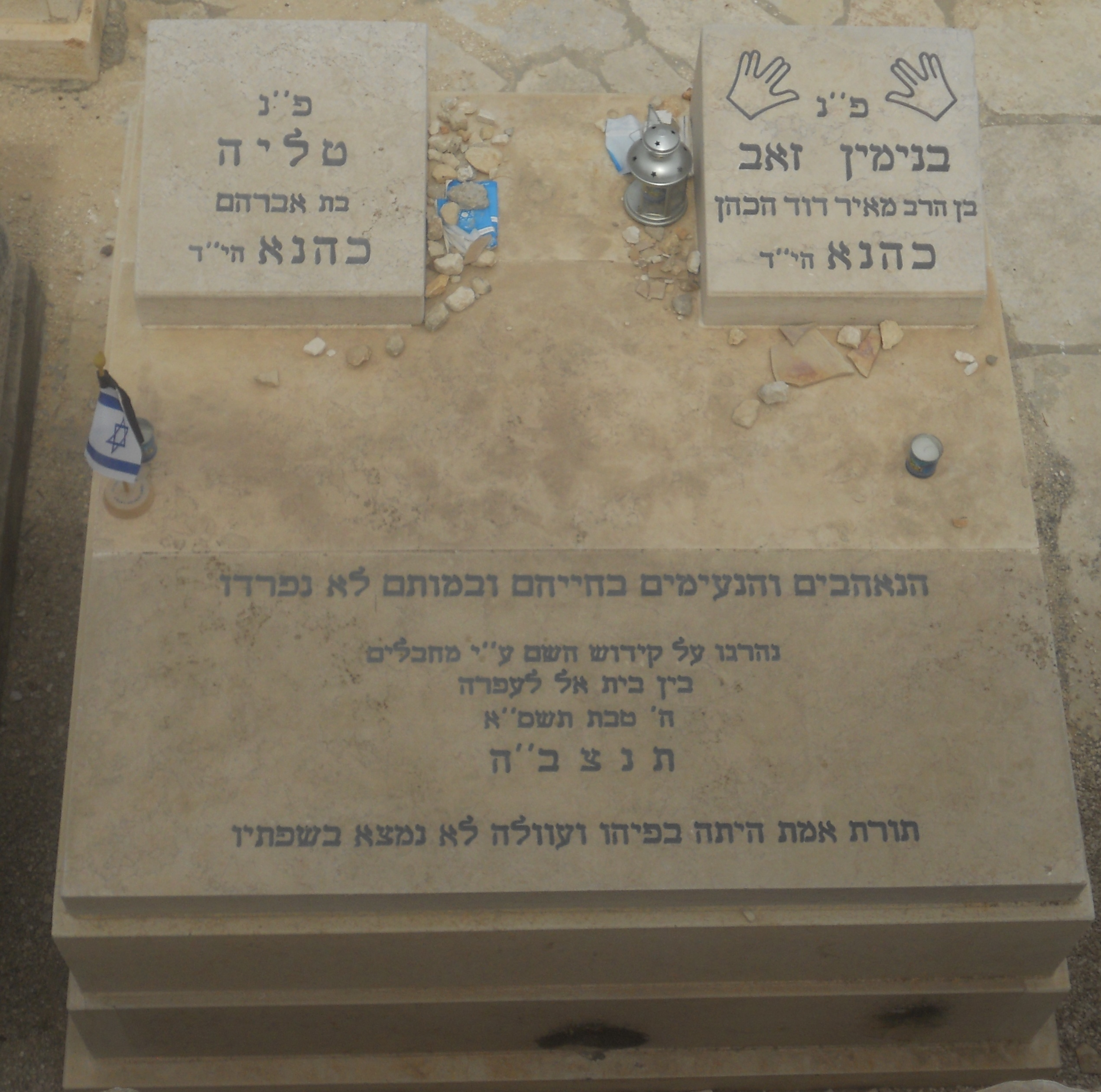 מצבת בנימין זאב וטליה כהנא